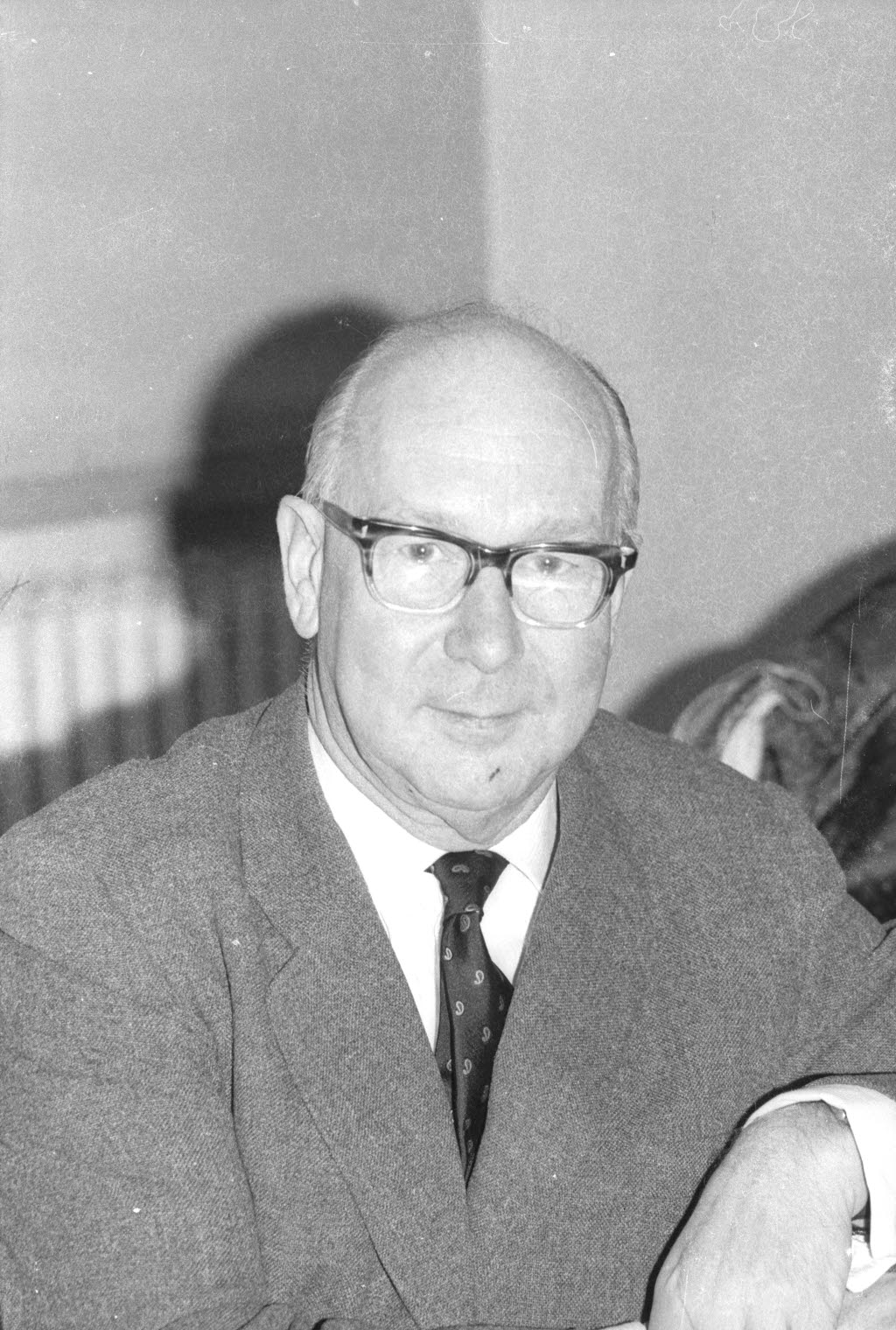 Direktor des Hygiene-Instituts der Christian-Albrechts-Universität (CAU). Referent der Kieler Universitätstage 1968.